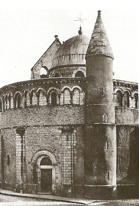 Neuvy_St.-Sépulcre, SW - Foto um 1923, von N